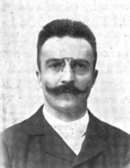 Oskar Emil Wantalowicz. In: Deutschlands, Österreich-Ungarns und der Schweiz Gelehrte, Künstler und Schriftsteller in Wort und Bild. 1. Auflage, Leipzig-Gohlis: Volger, 1908, S. 538